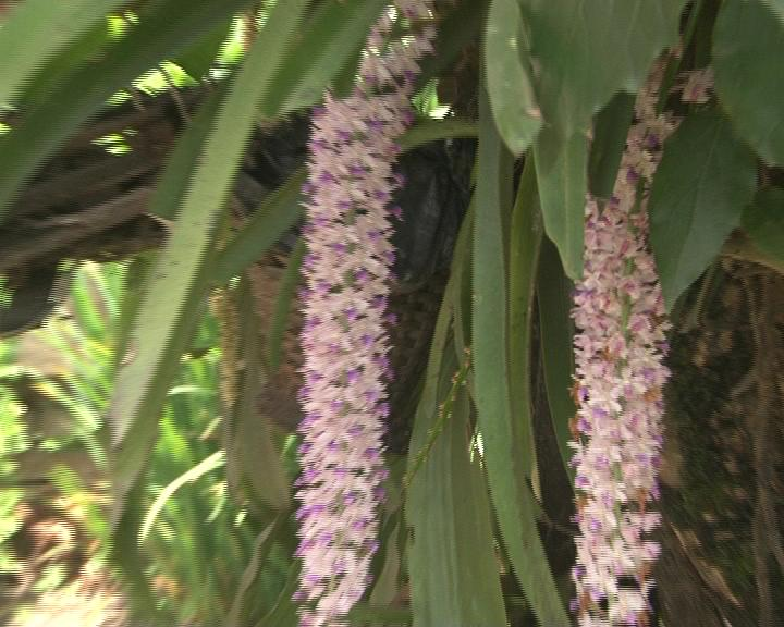 नेपाली: सुनगाभा